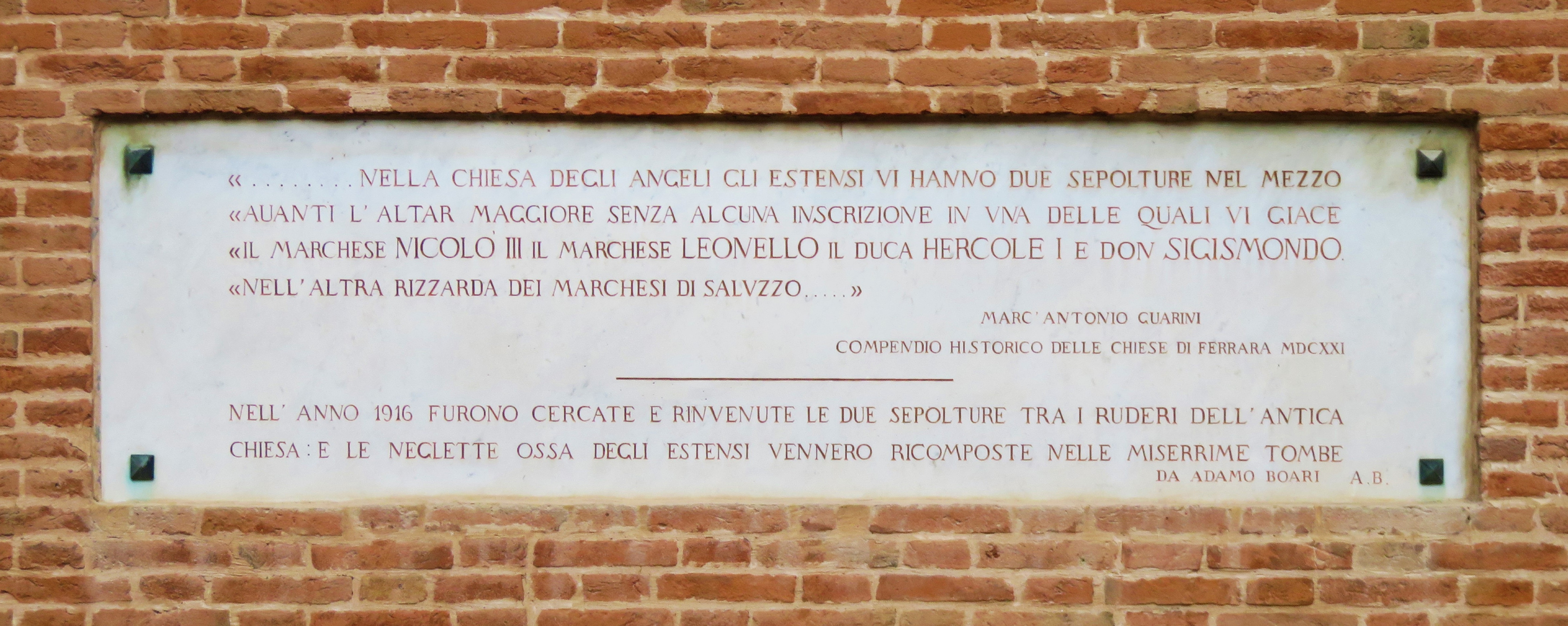 Lapide sulla facciata.